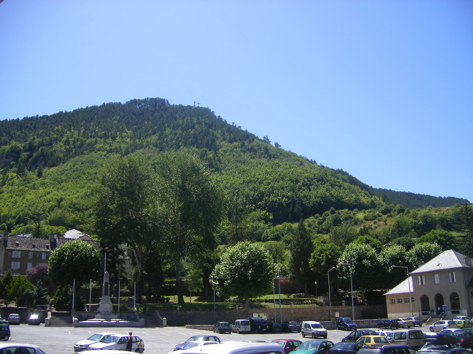 Mende - Mont Mimat